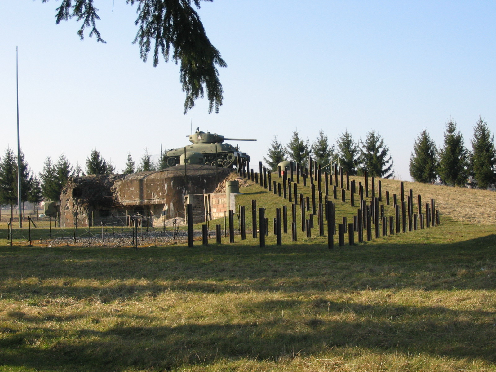 Casemate Esch, élément de la ligne Maginot. Détail sur la défense anti-char.